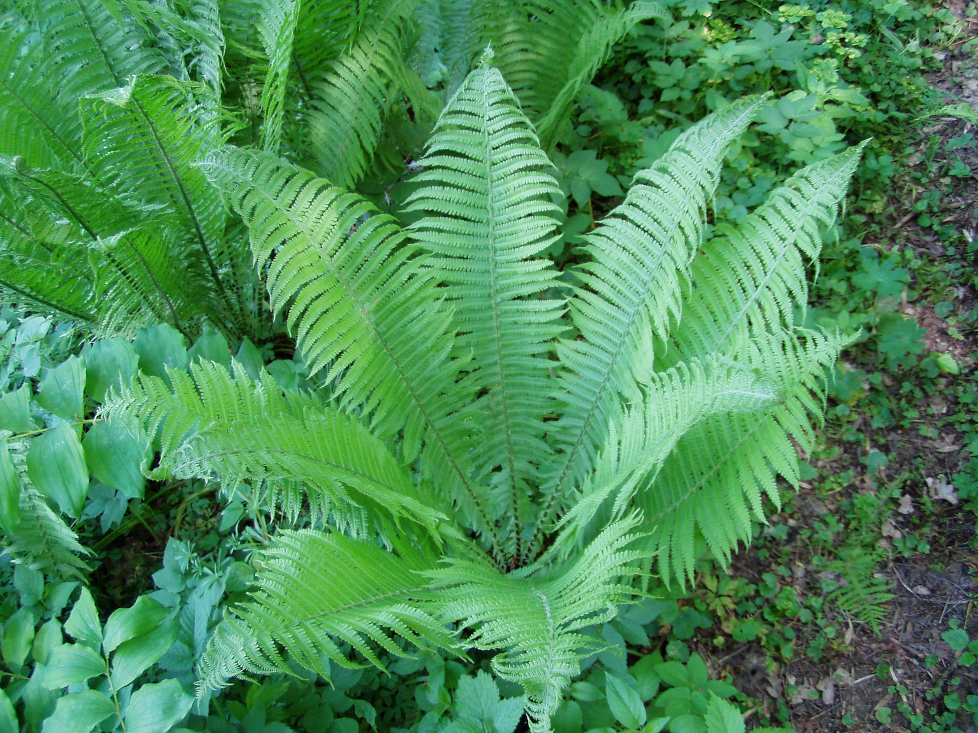 Matteuccia strutiopteris